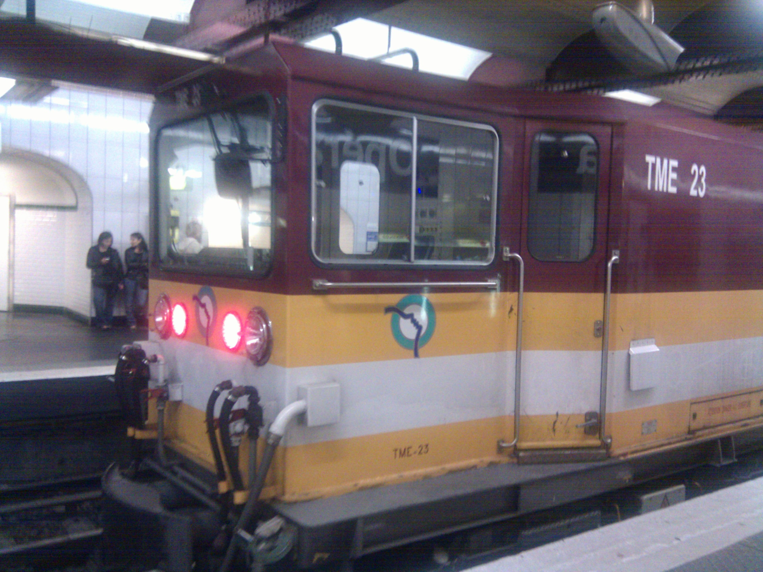 Un TME à la station Opéra ligne 3 en fin de soirée.